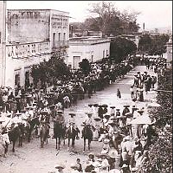 Fotografía levantamiento de Armas Juchipila